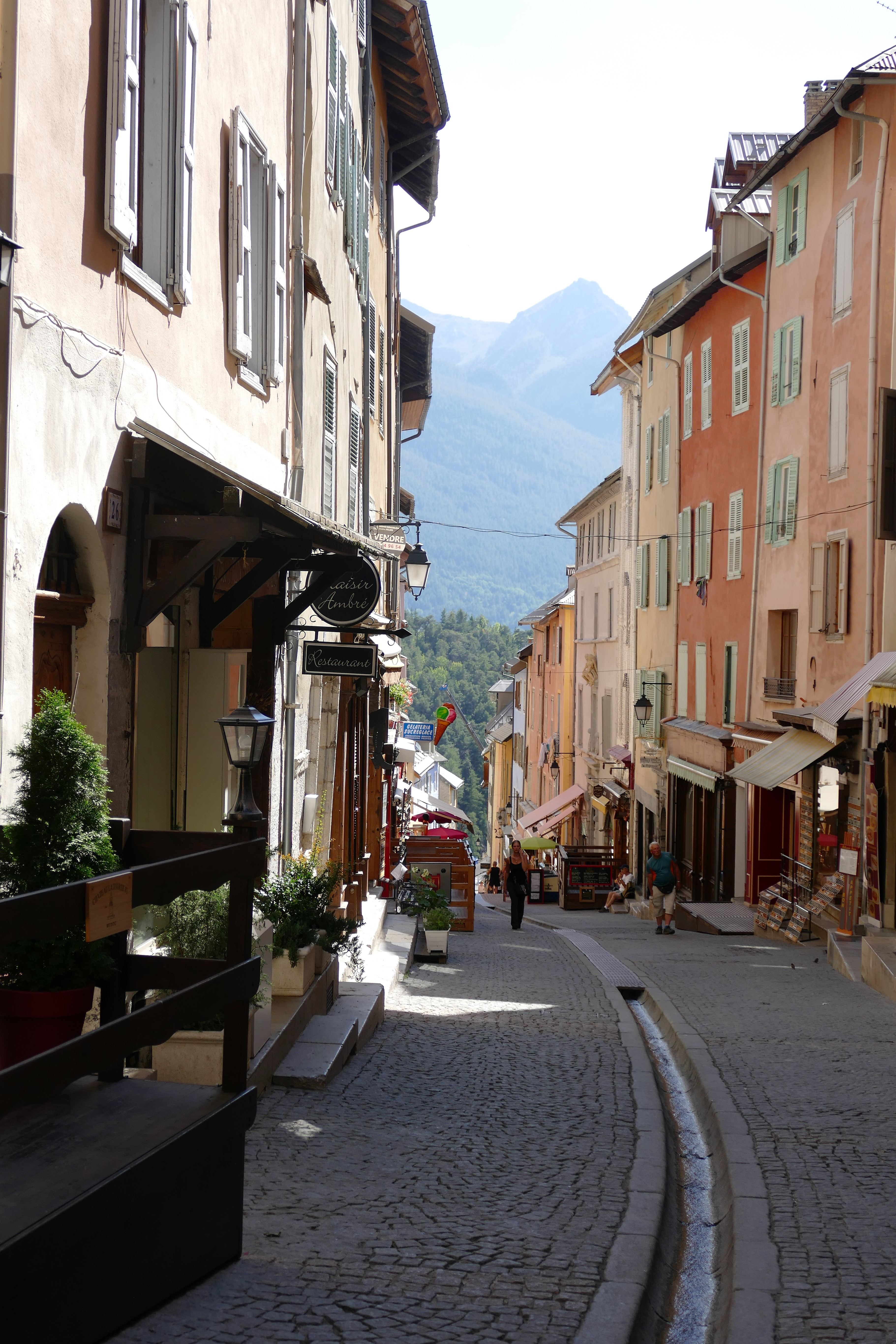 Briançon